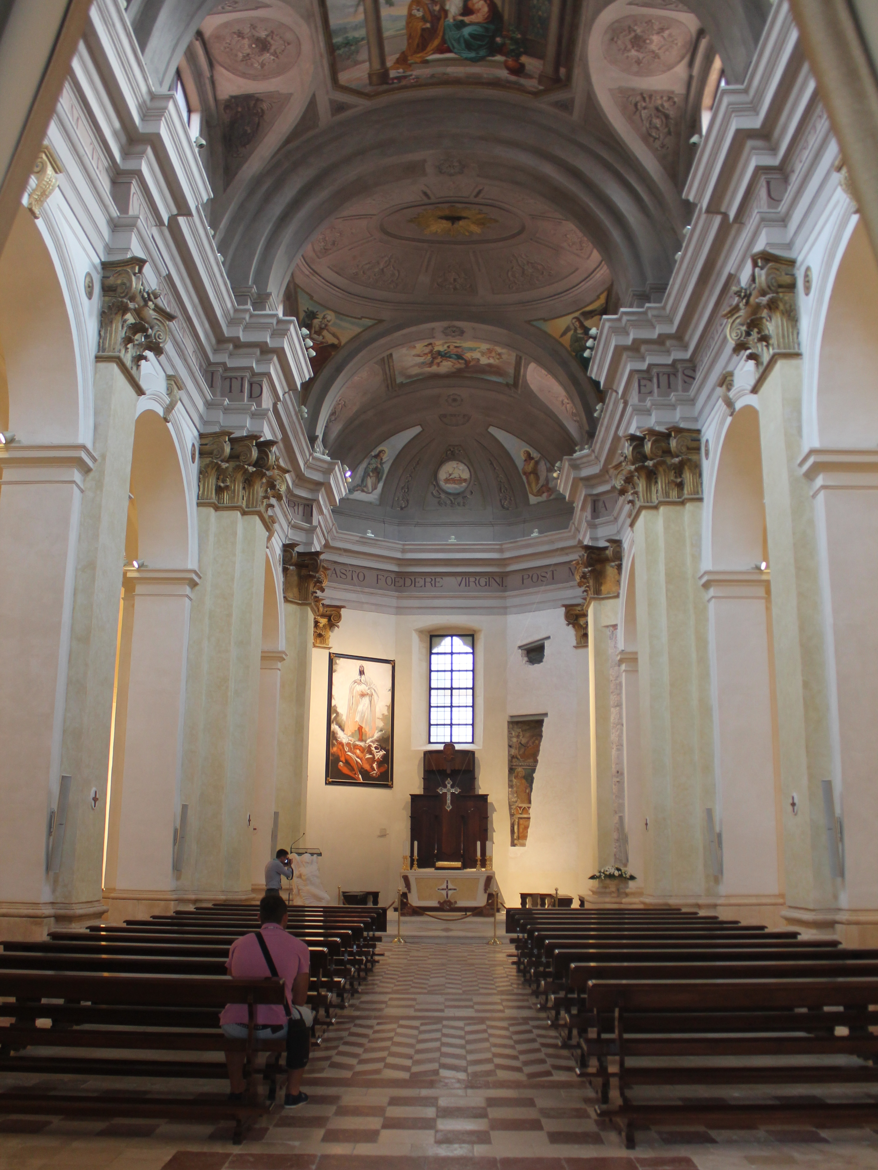 Interno della chiesa di San Biagio in L'Aquila: navata centrale